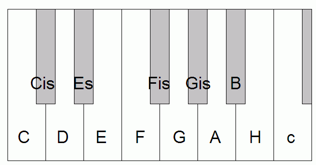 12-stufige mitteltönige Tastatur